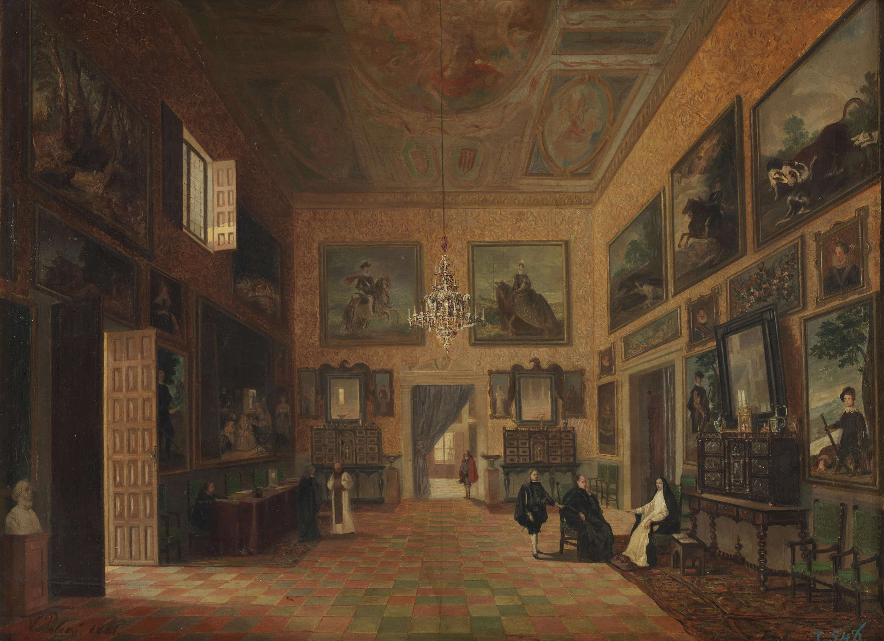 La obra representa a la reina Mariana de Austria (1634-1696), viuda del rey Felipe IV de España y regente del Reino, conversando con el padre Juan Everardo Nithard (1607-1681), que llegaría a ser cardenal de la Iglesia Católica e Inquisidor general de España, desarrollándose la escena en la Cámara de Felipe IV del Palacio del Buen Retiro de Madrid.